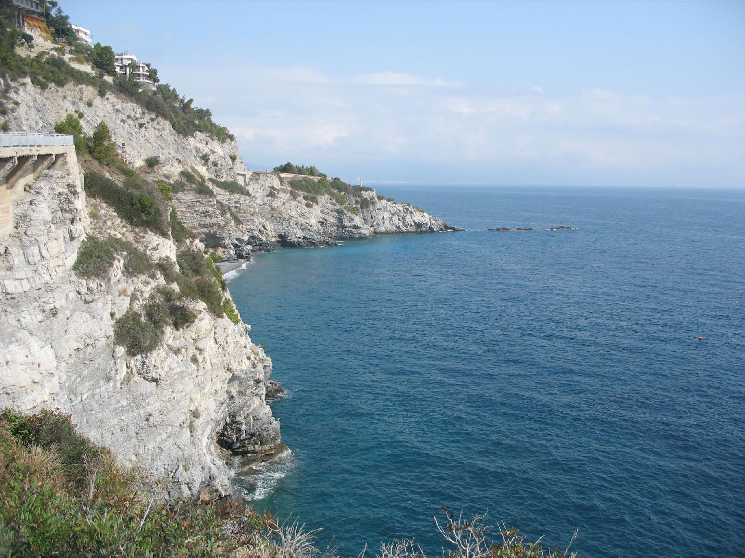 Bergeggi coastline